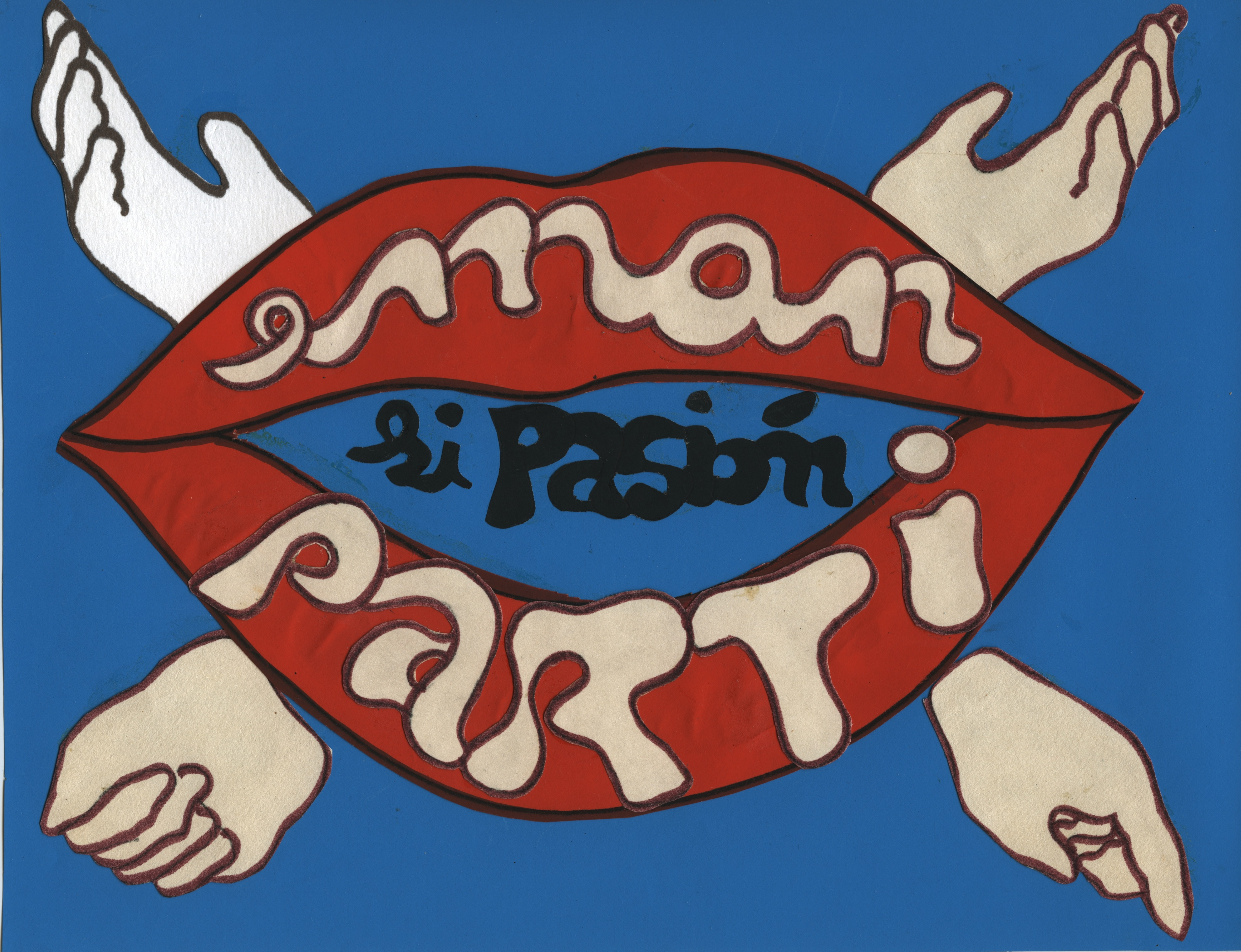 Eman si pasión - Parti si pasión 1974 Silkscreen on paper - 58.4 x 88.9 cm